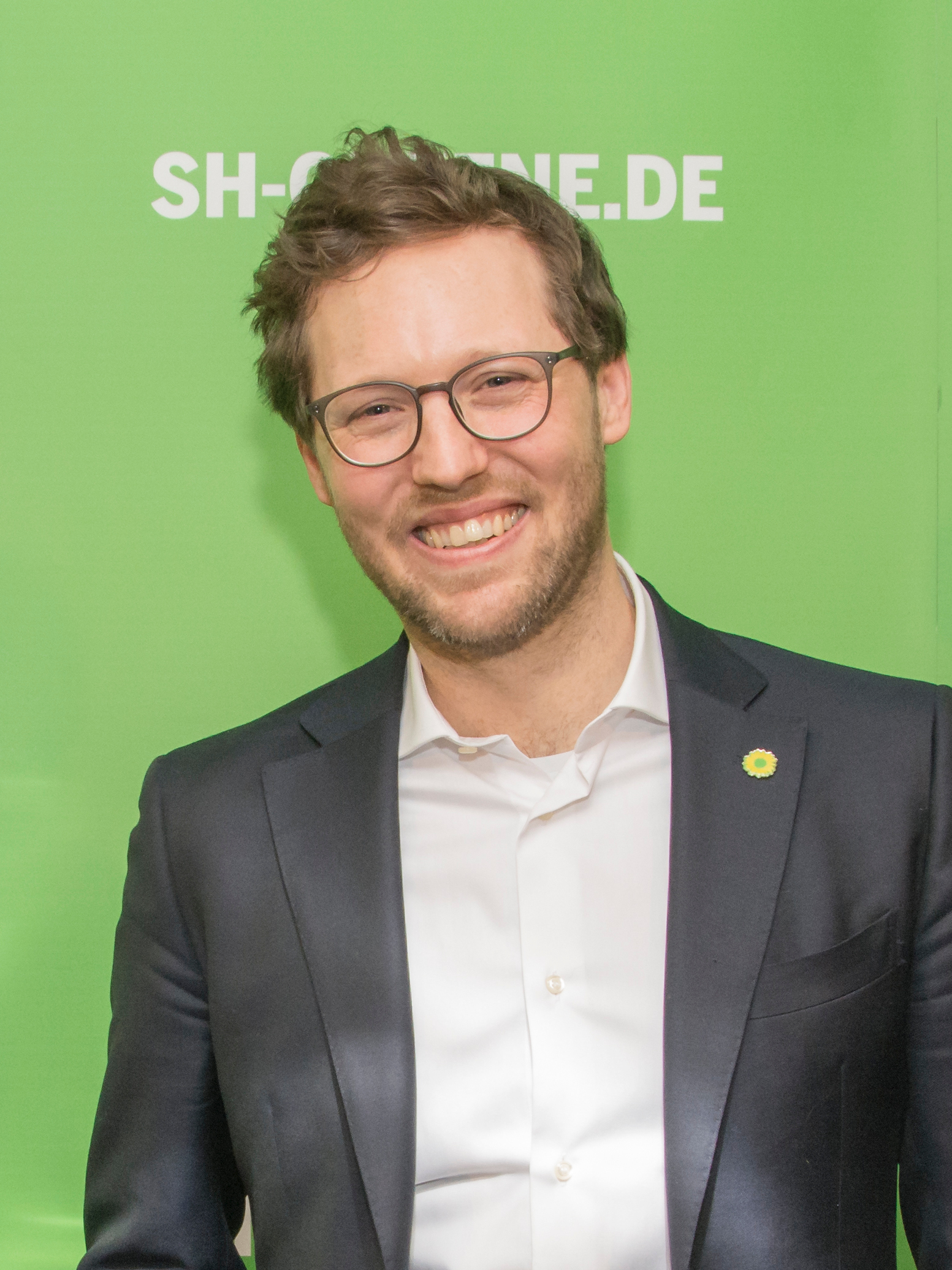 Photo: Fenja Hardel. License: CC BY-SA 3.0 DE